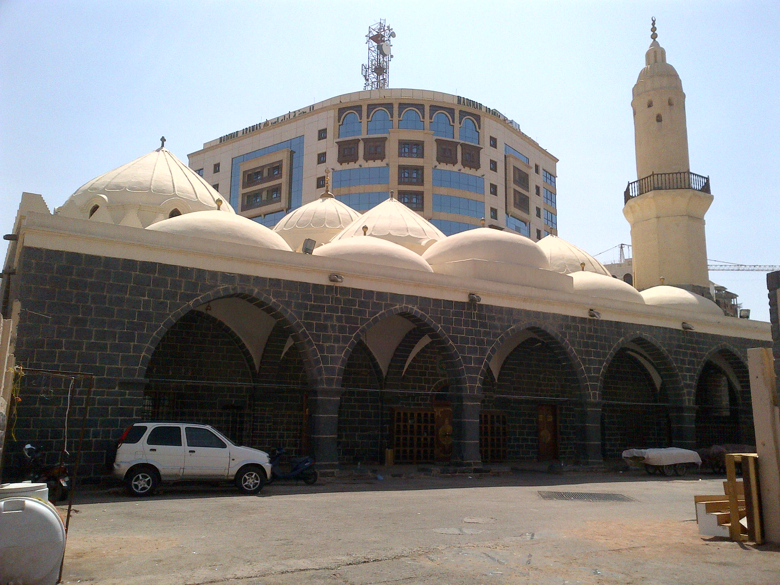 Terletak di Barat Masjid Nabawi